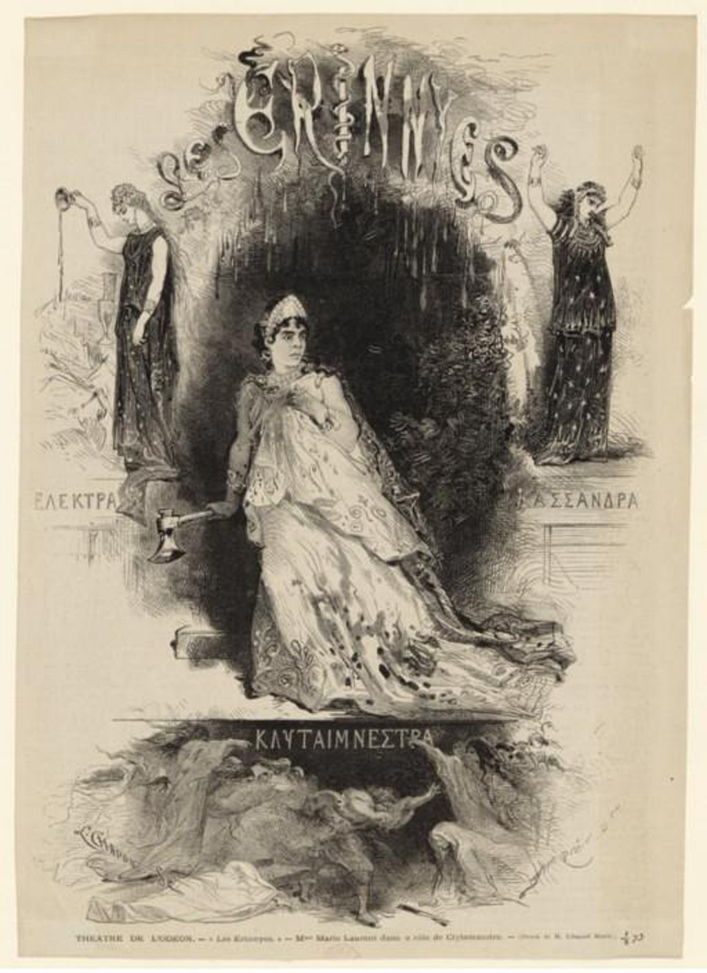 Théâtre de l'Odéon : affiche de "Les Erinnyes" ; Marie Laurent dans le rôle de Clytemnestre.